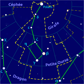 Carte pour la constellation de la Petite Ourse Produite à l'aide du logiciel PP3